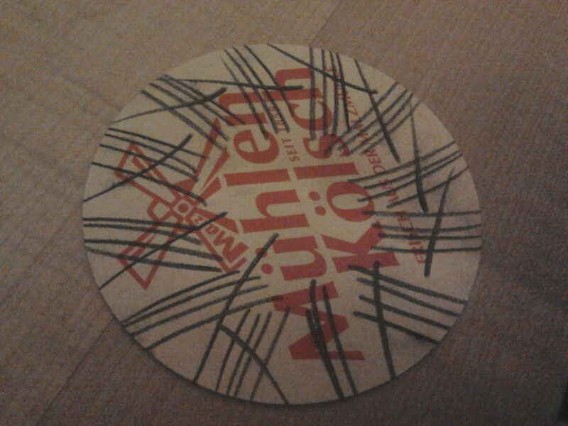 Bierdeckel mit Strichliste, wobei jeder Strich ein konsumiertes Getränk symbolisiert (uniforme Kosten).